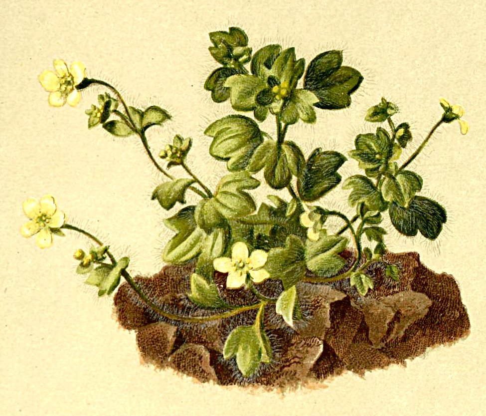 Saxifraga arachnoides